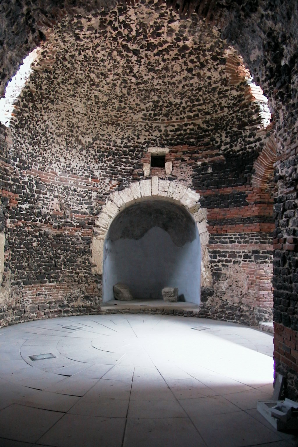 Interno del tempietto di Mesumundu dopo i restauri del 2000-01 Questa immagine l'ho realizzata io--Fpittui (msg) 10:23, 21 mag 2010 (CEST)